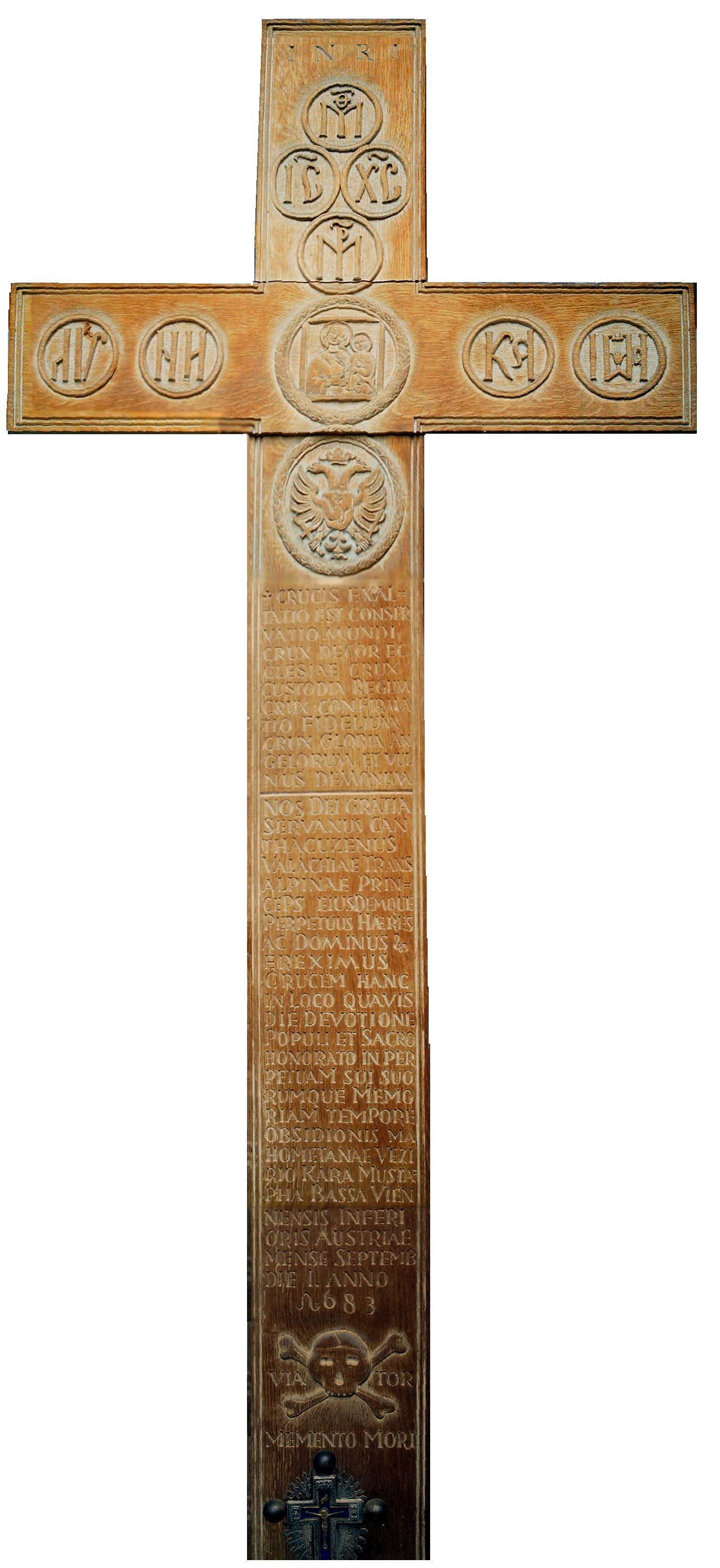 Moldauer Kapelle in Vienna (Arnsburggasse/Betty-Roose-Strasse)